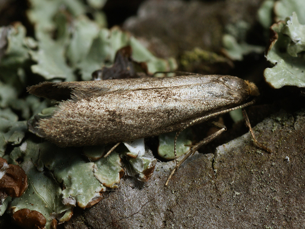 Exemplar found: Russia, Moscow Oblast, Orekhovo-Zuyevsky District, near settlement Topoliny, 18.07.2017, by light МО, Орехово-Зуевский р-н, окрестности посёлка Тополиный, 18.07.2017, на свет